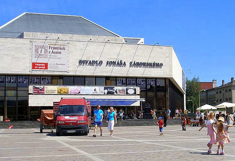 Oslavy Dňa detí v Prešove región Šariš